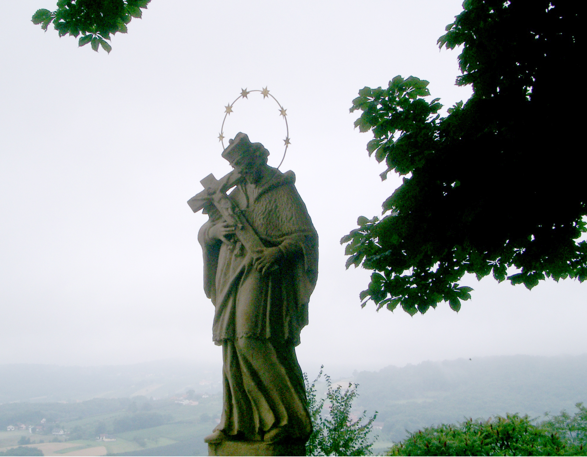 Figurenbildstock hl. Johannes Nepomuk